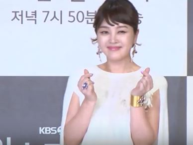 27일 오후 서울 영등포구 영등포동 타임스퀘어 아모리스홀에서 KBS 2TV 일일드라마 '왼손잡이 아내' 제작발표회가 열렸다.